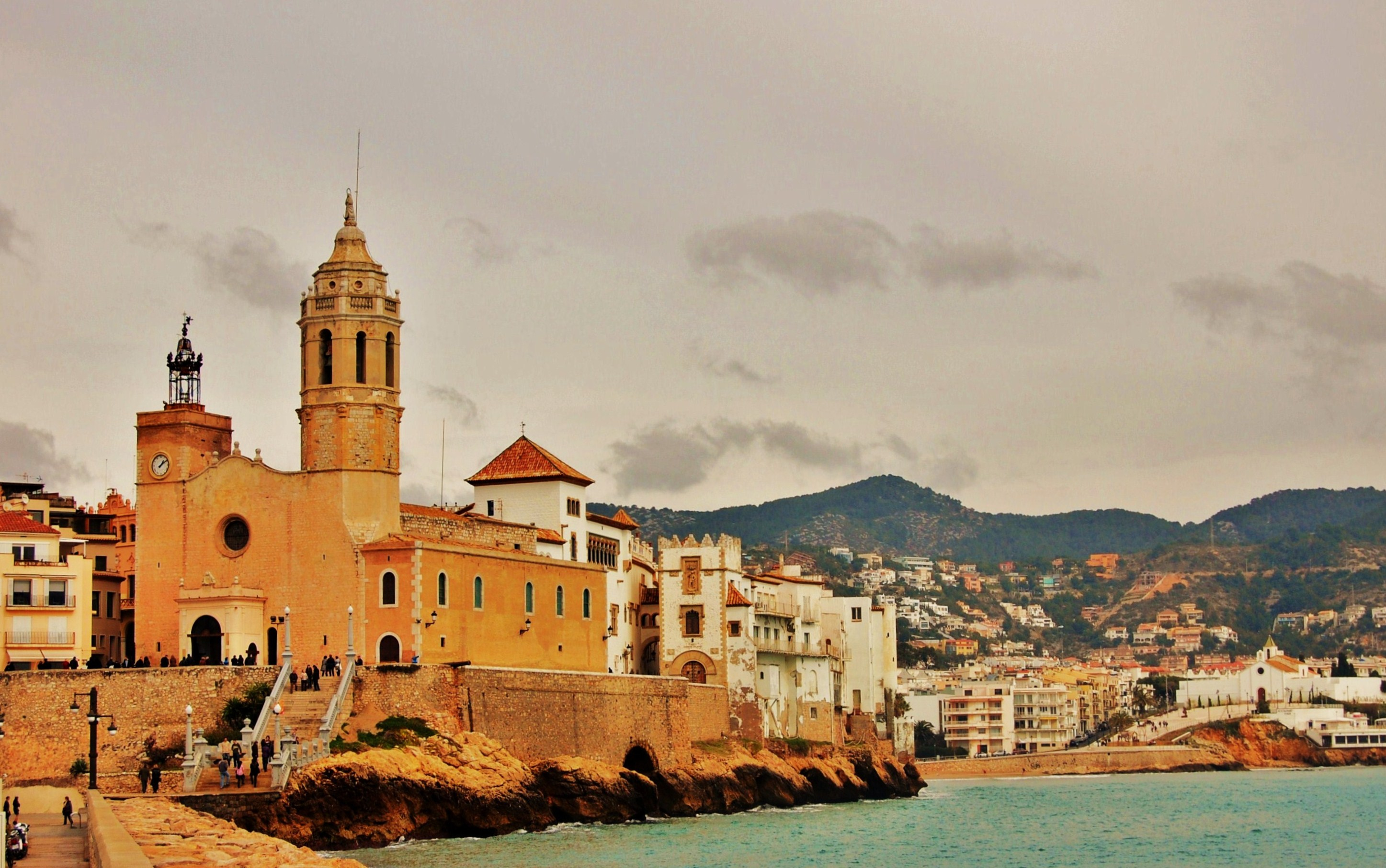 Escales de la Punta i església de Sant Bartomeu i Santa Tecla de Sitges, al fons la platja de Sant Sebastià This is a a photo of a beach in Catalonia, Spain, with id: PL-CT-17003-304